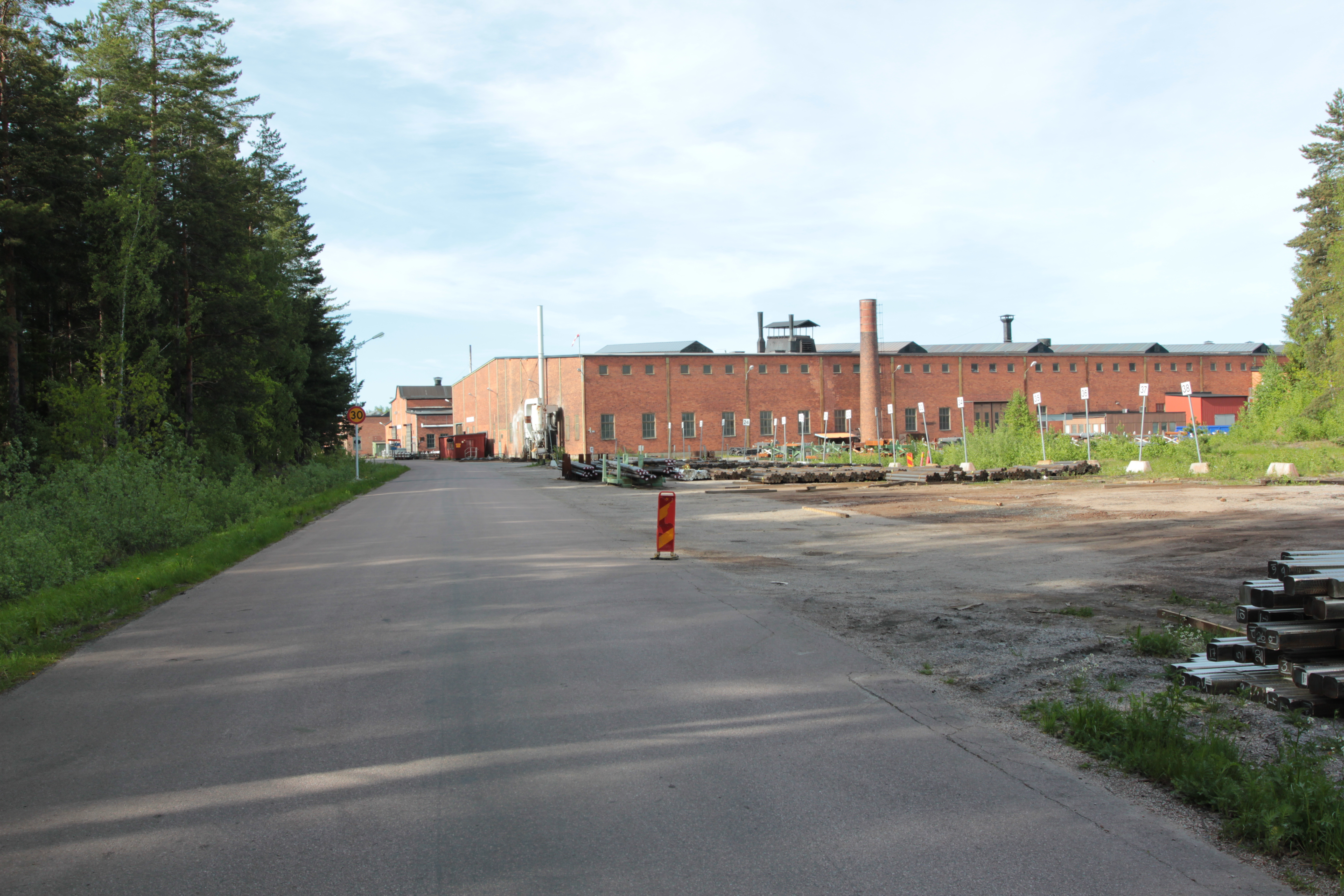 Östra verken, Söderfors. Foto uppladdat som en del i Bergslagssafarin 26 maj 2012.